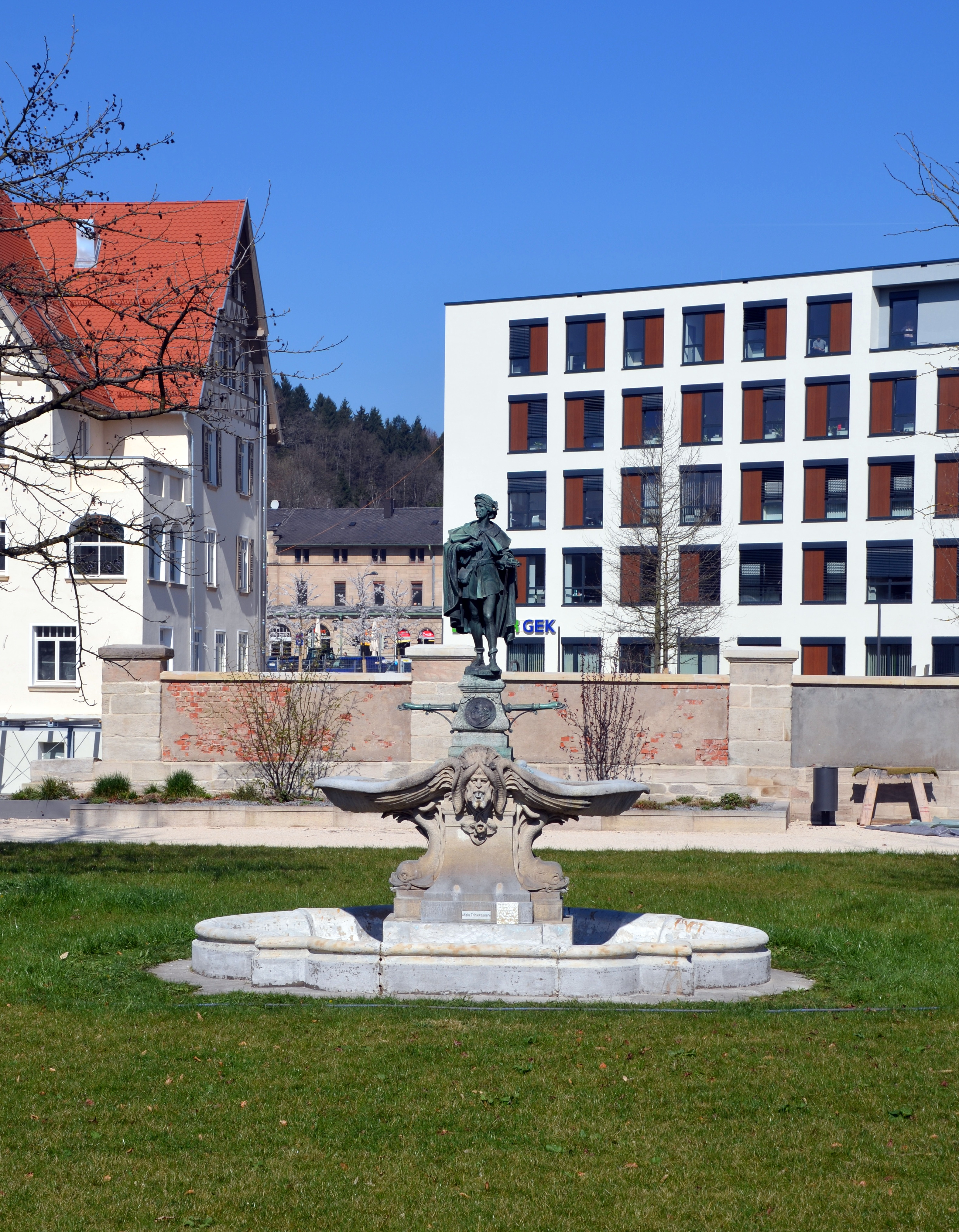 Geigerbrunnen von Wilhelm Widemann im Stadtgarten Schwäbisch Gmünd